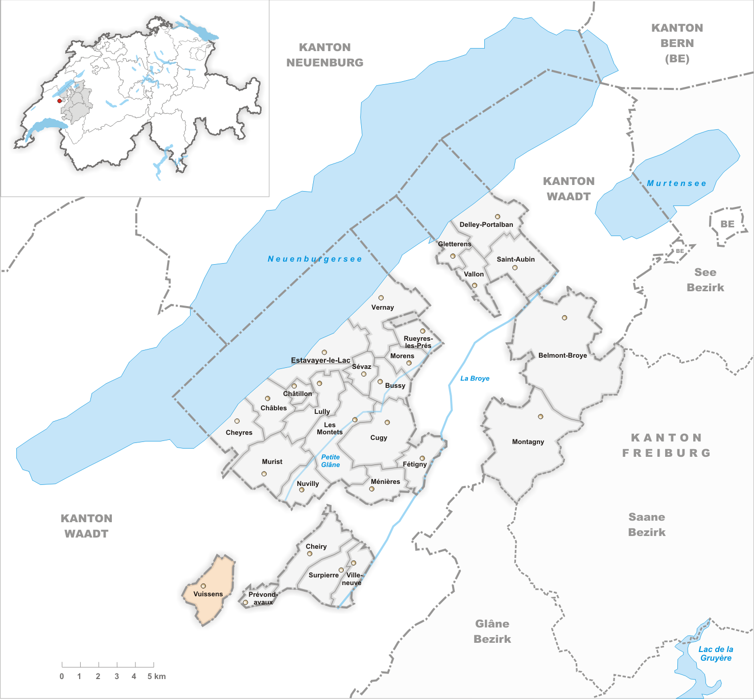 Municipality Vuissens